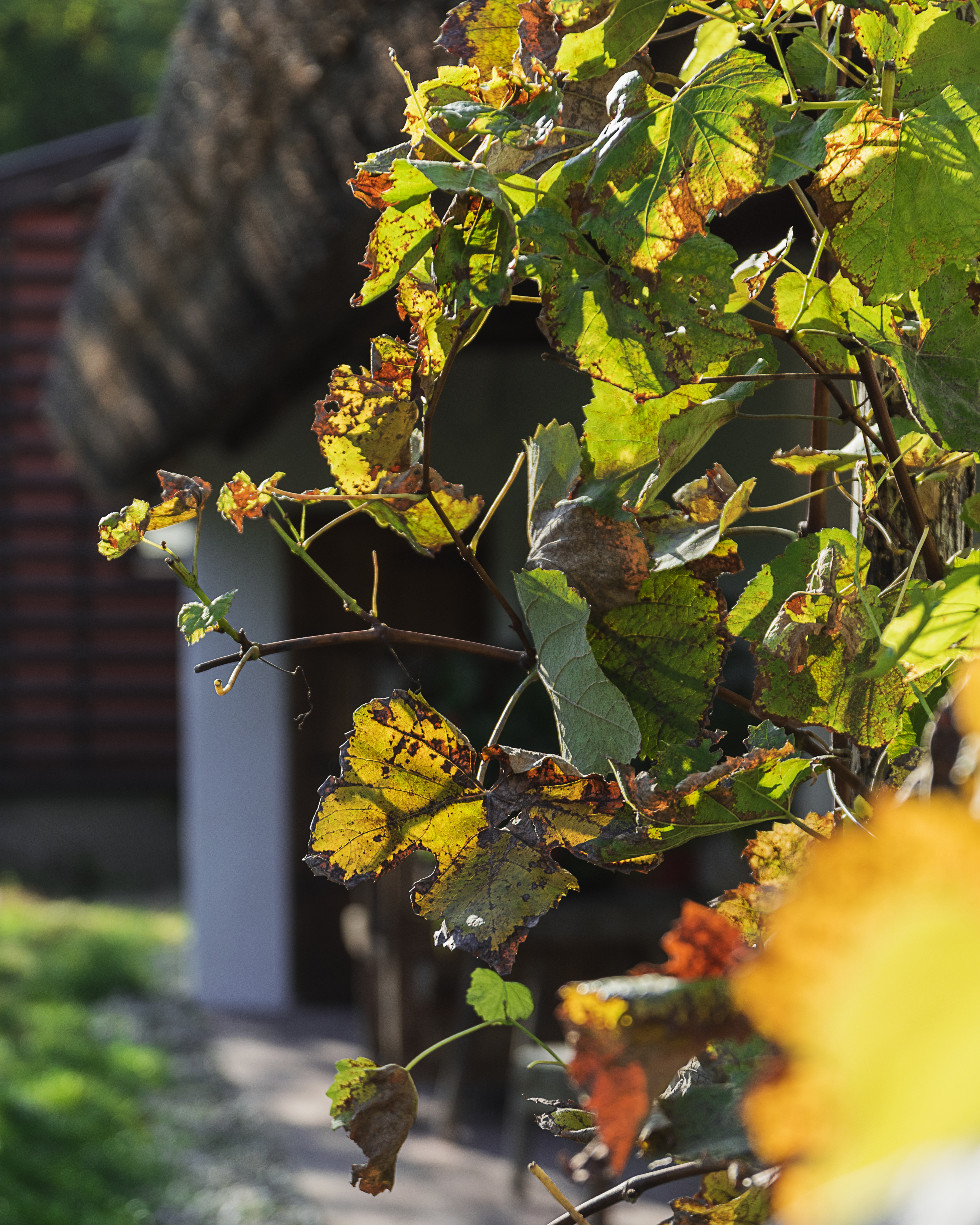 Tulajdonosa és működtetője a Felpécért Alapítvány. Új épületrész alkalmassá teszi közösségi programok tartására is.